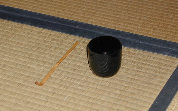 Chado2